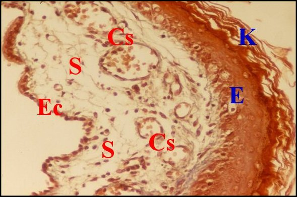 Paroi de cholestéatome montrant de l'oedème et une vasodilatation